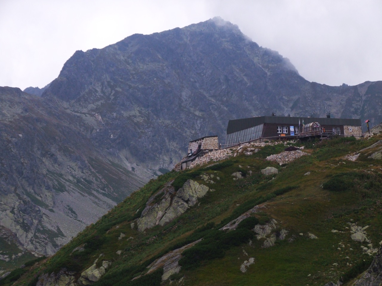 Schronisko Zbójnicka Chata w Dolinie Staroleśnej (słowackie Tatry Wysokie)